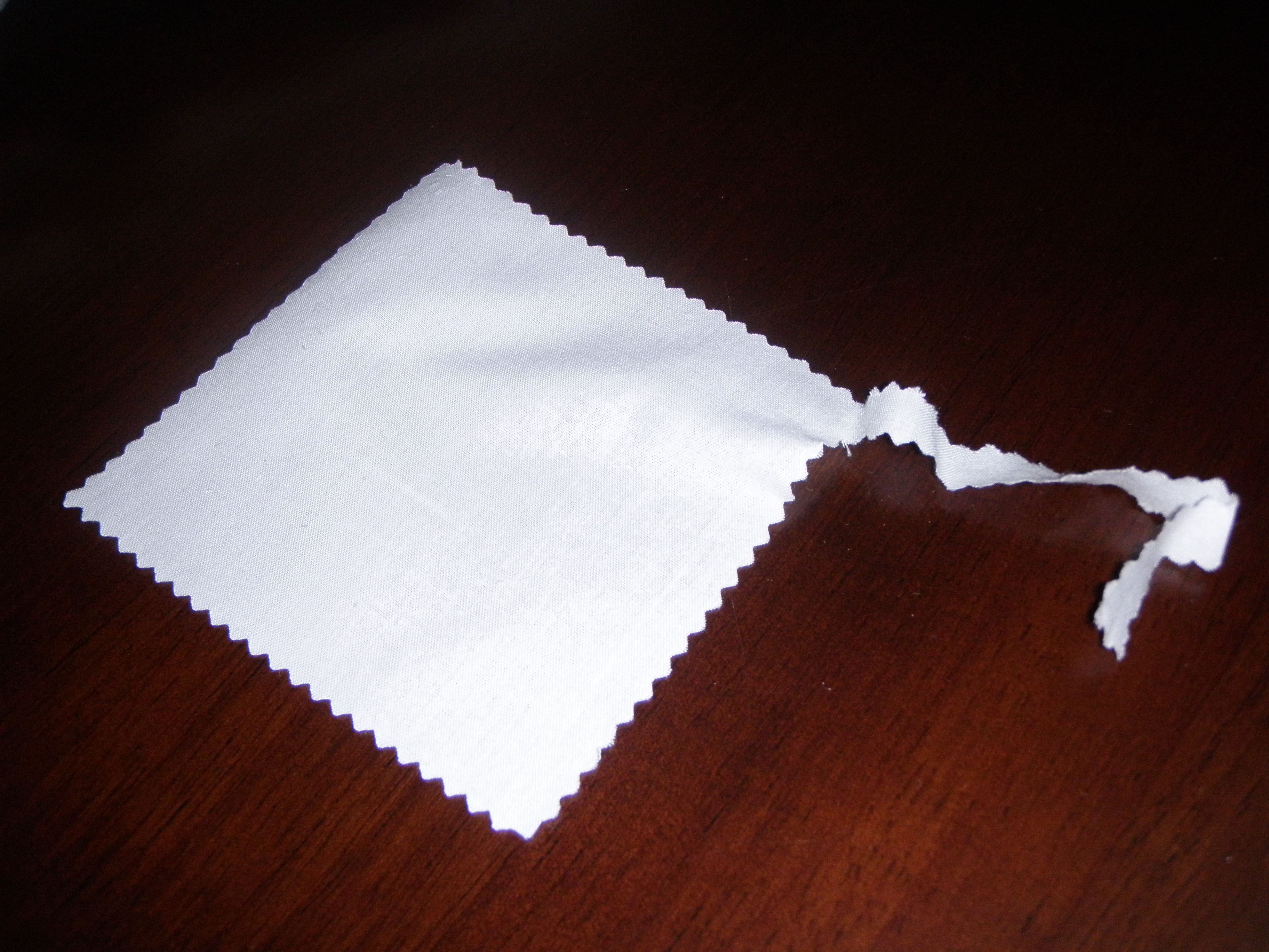 ed bdika